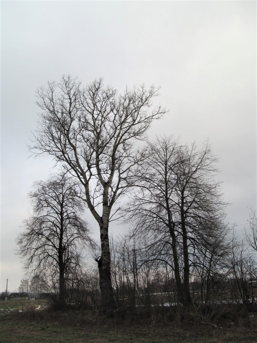 Цяраспаль. Рэшткі фальваркавых прысадаў